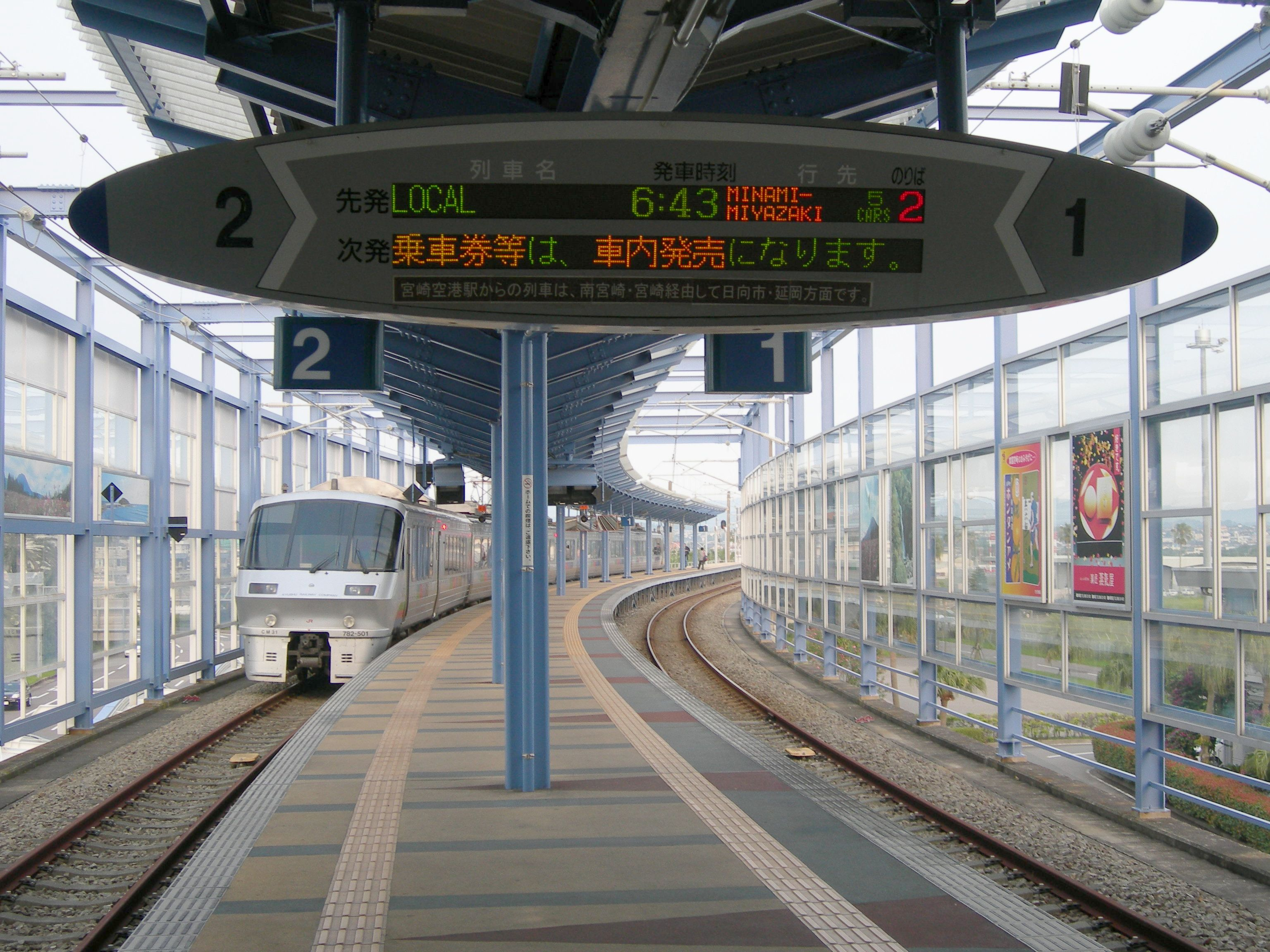 宮崎空港駅プラットホーム